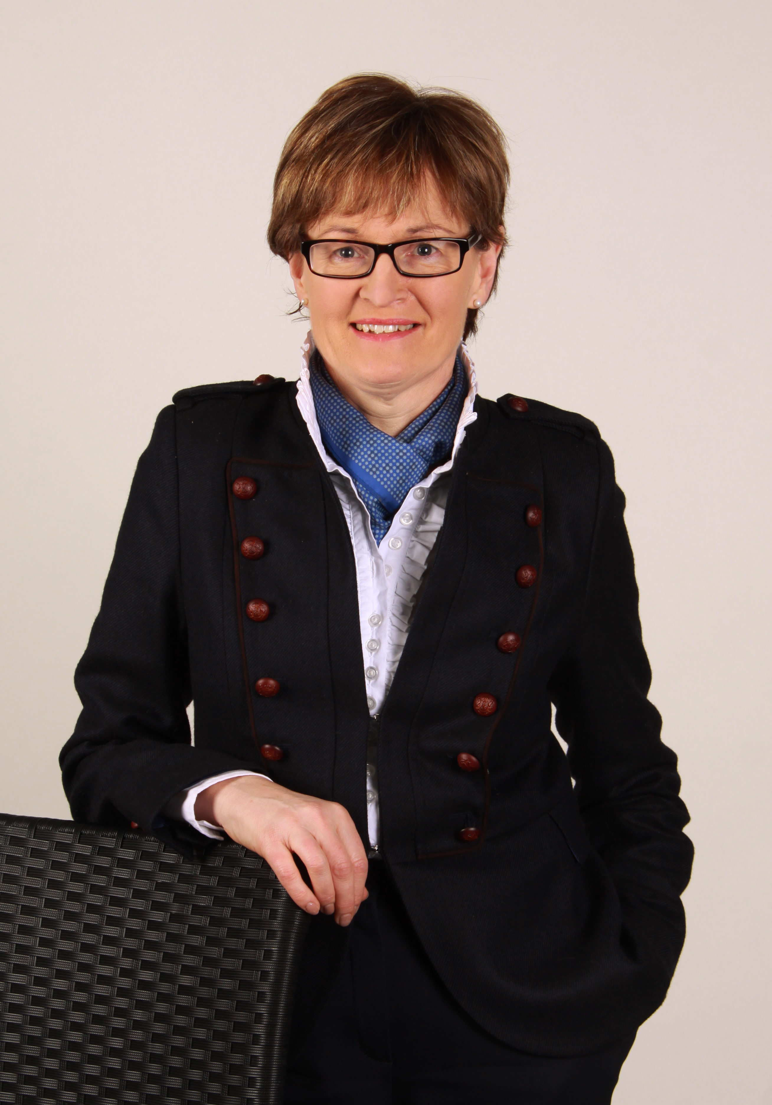 Abgeordnete/r Europaparlament